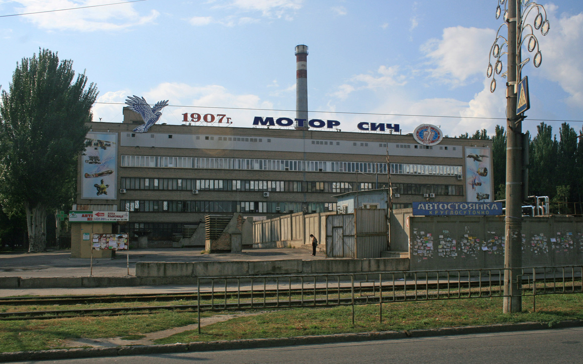 Здание предприятия Мотор Сич.